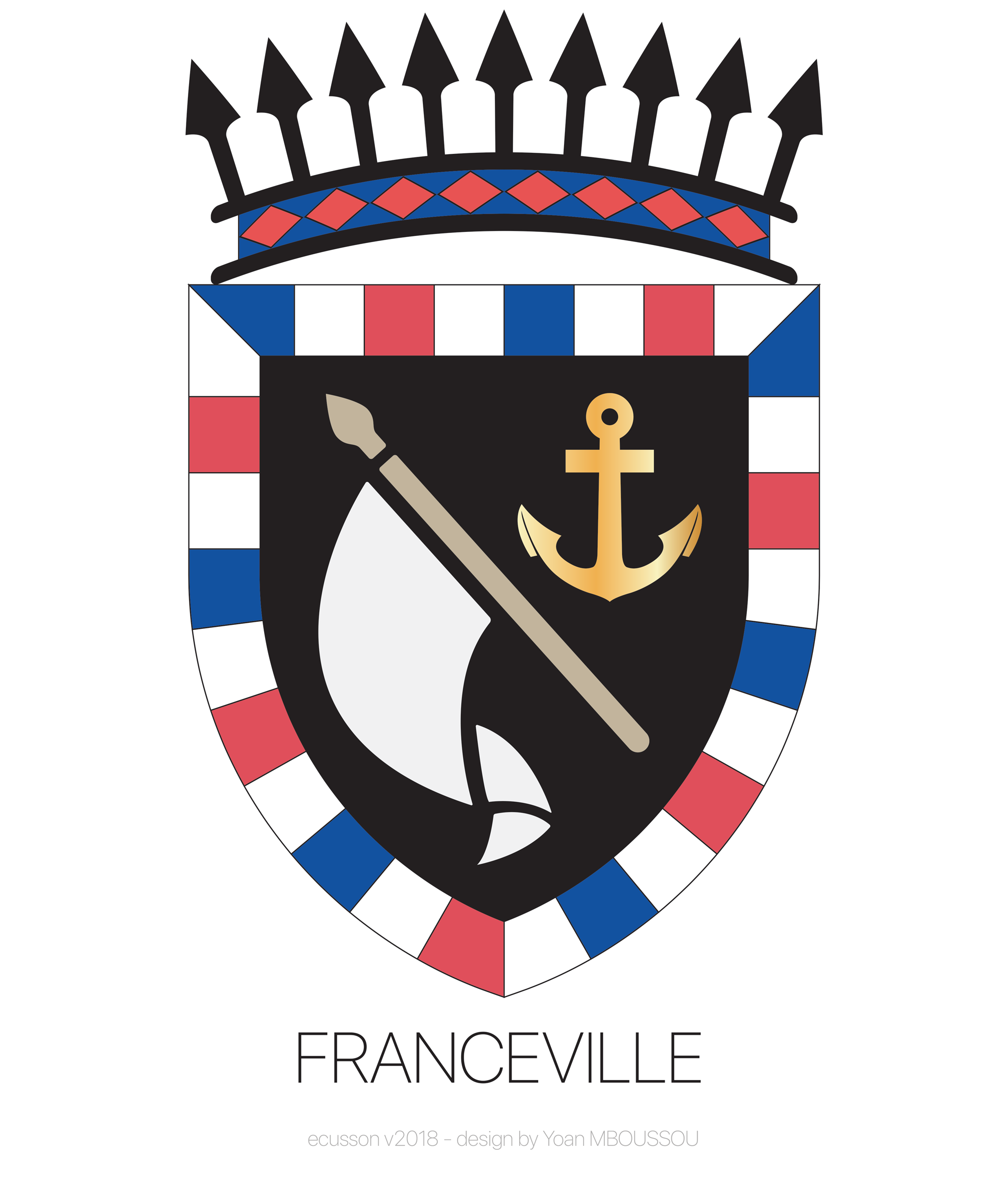 Ecusson de la ville de Franceville